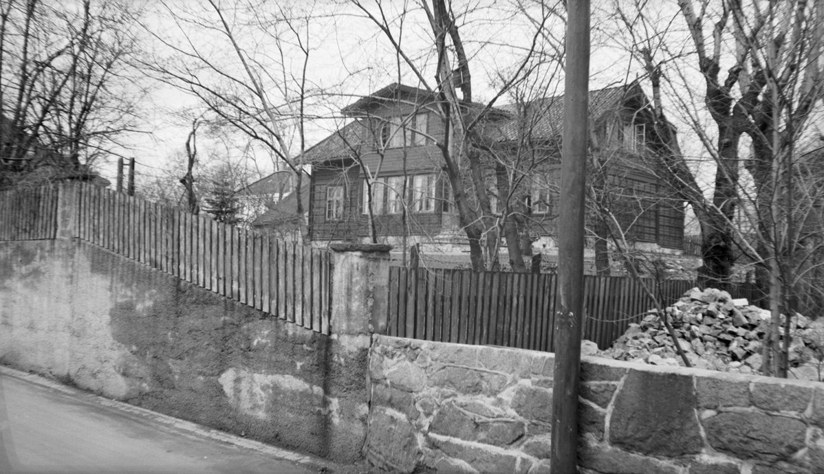 Løkkehuset på Sognhøi eller Sognshaug, Professor Dahls gate 44. Foto: Fritz Holland (1937). Fra Byhistorisk samling hos Oslo Museum.